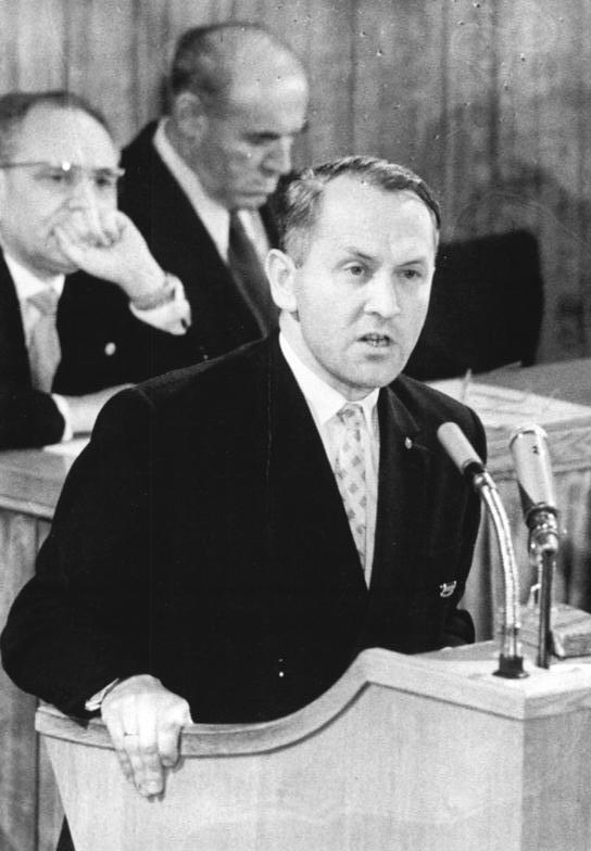 Zentralbild-Sturm- 4.10.1960 15. Sitzung der Volkskammer der DDR Im In- und Ausland mit größtem Interesse erwartet ist die Volkskammer der Deutschen Demokratischen Republik am 4.10.1960 um 11.00 Uhr zu ihrer 15. Sitzung zusammengetreten. Auf der Tagesordnung stehen eine Erklärung des Staatsrates der Republik, das "Gesetz über die Anpassung von gesetzlichen Bestimmungen an die Bildung des Staatsrates der Deutschen Demokratischen Republik" in erster und zweiter Lesung sowie Anzeigen des Ausschusses für Eingaben der Bürger. UBz.: Den Standpunkt der CDU-Fraktion zu der programmatischen Erklärung Walter Ulbrichts erläuterte der Abgeordnete Dr. Toeplitz.